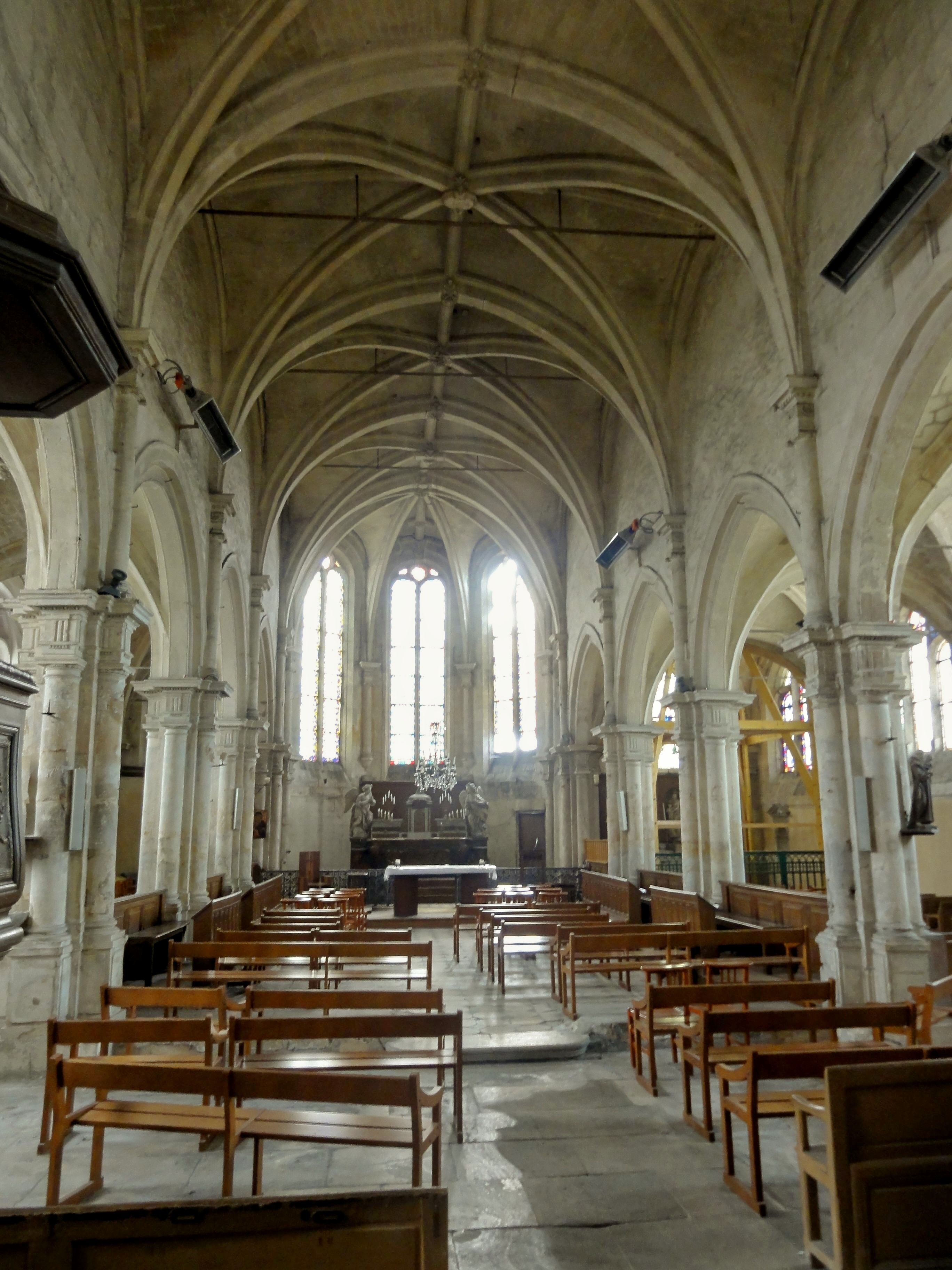 Vue générale intérieure.